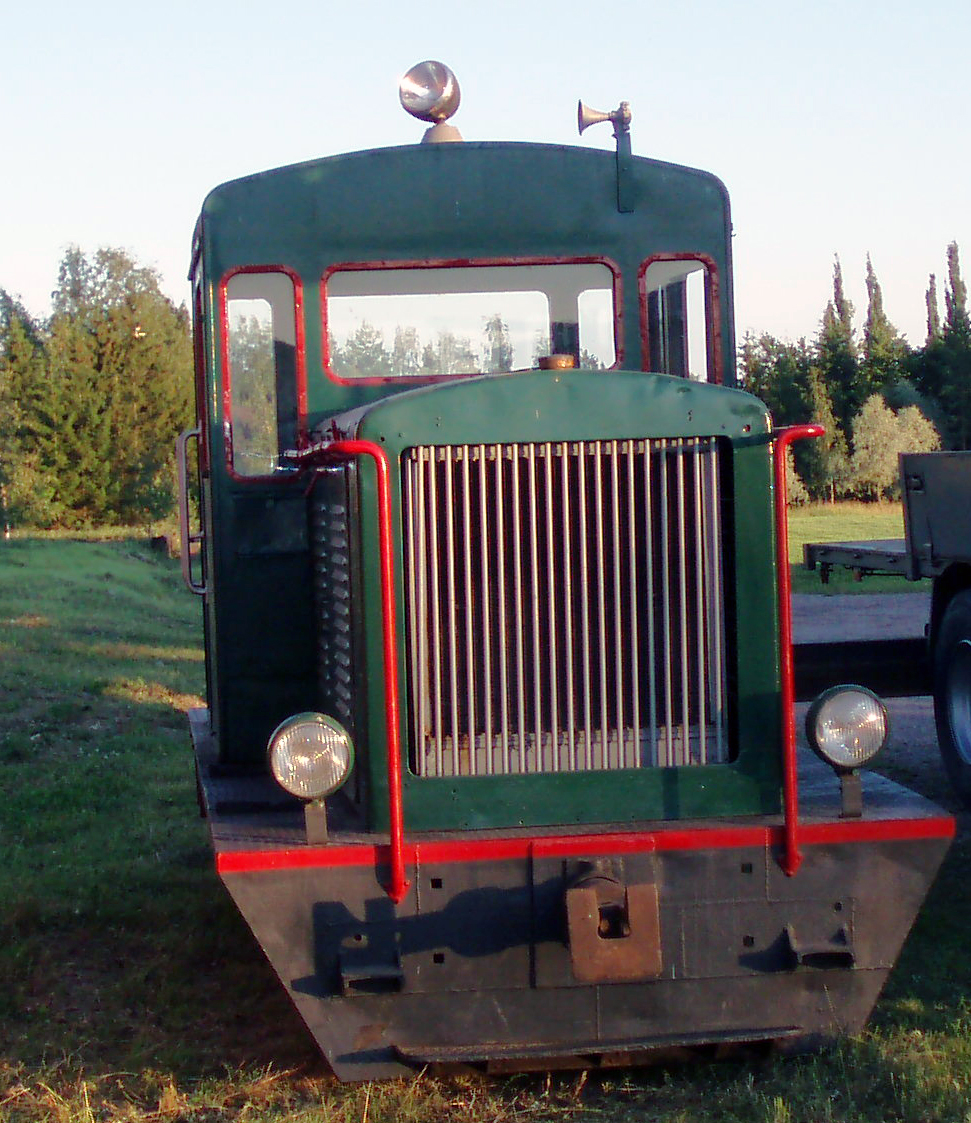 HKR:n Move 21-veturi Minkiöllä